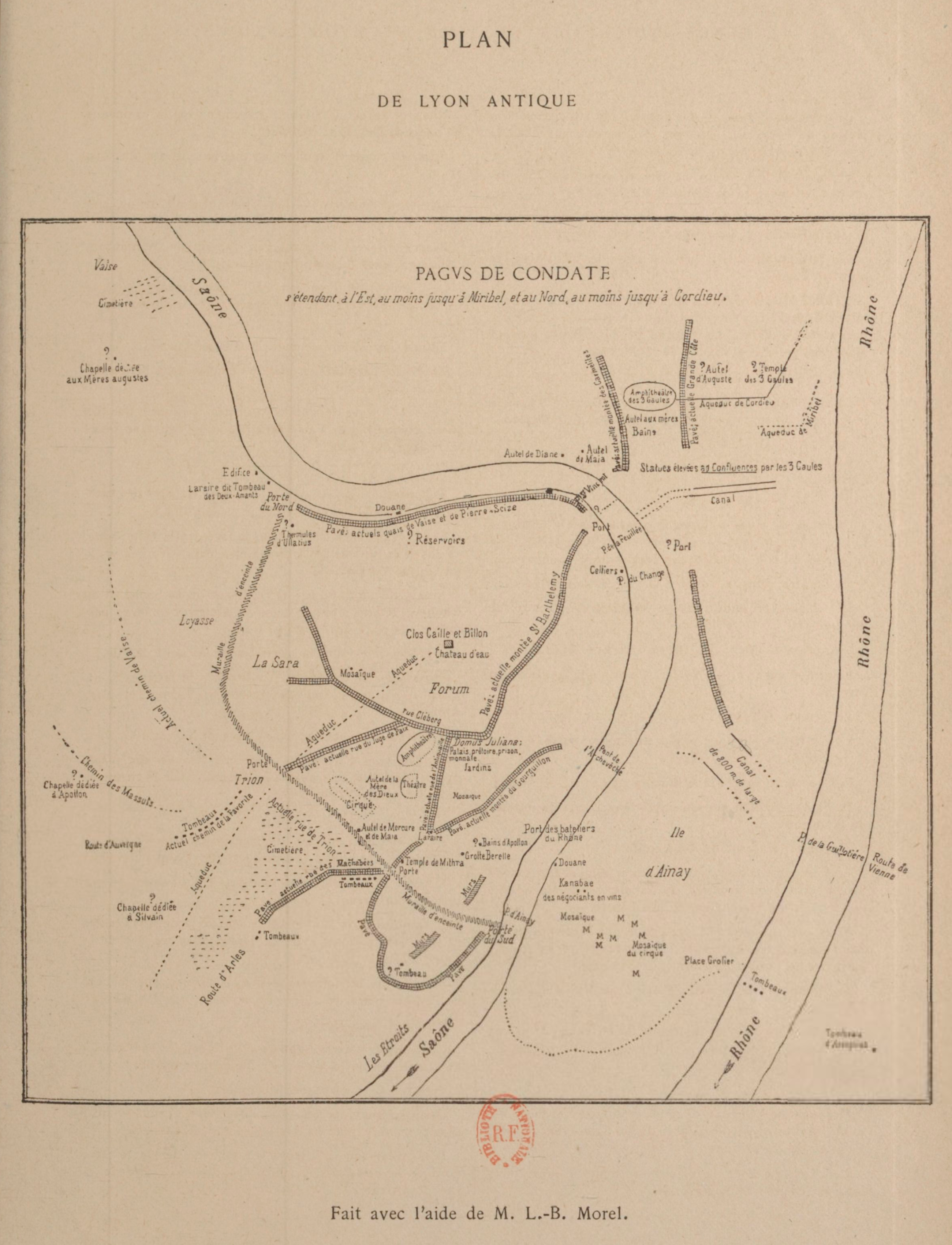 Plan de Lyon antique. Dans Auguste Allmer et Paul Dissard, Inscriptions antiques, t. 3 (1890). La page précédente dans le livre donne la « légende indicatrice du Lyon antique », avec anecdotes. Collection d'antiquités du musée des Beaux-Arts de Lyon.